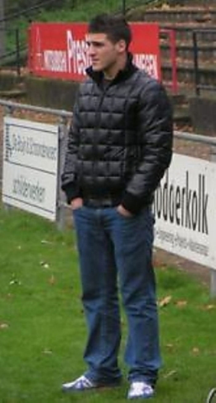 Nederlands voetbalspeler